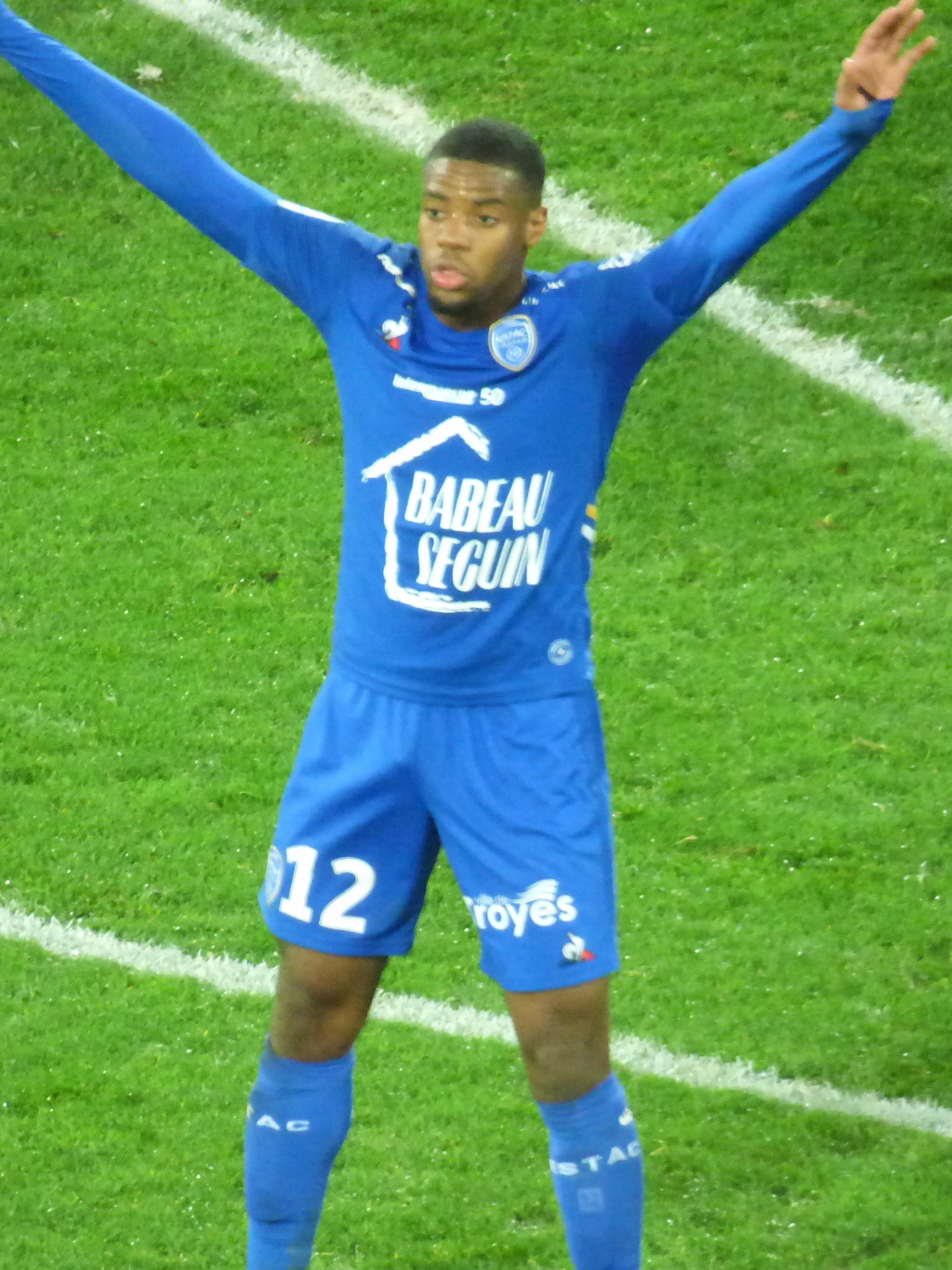 Warren Tchimbembé lors du match RC Lens / ES Troyes AC, comptant pour la vingt-troisième journée du championnat de France de football de Ligue 2 2019-2020, le 4 février 2020, au Stade Bollaert-Delelis de Lens